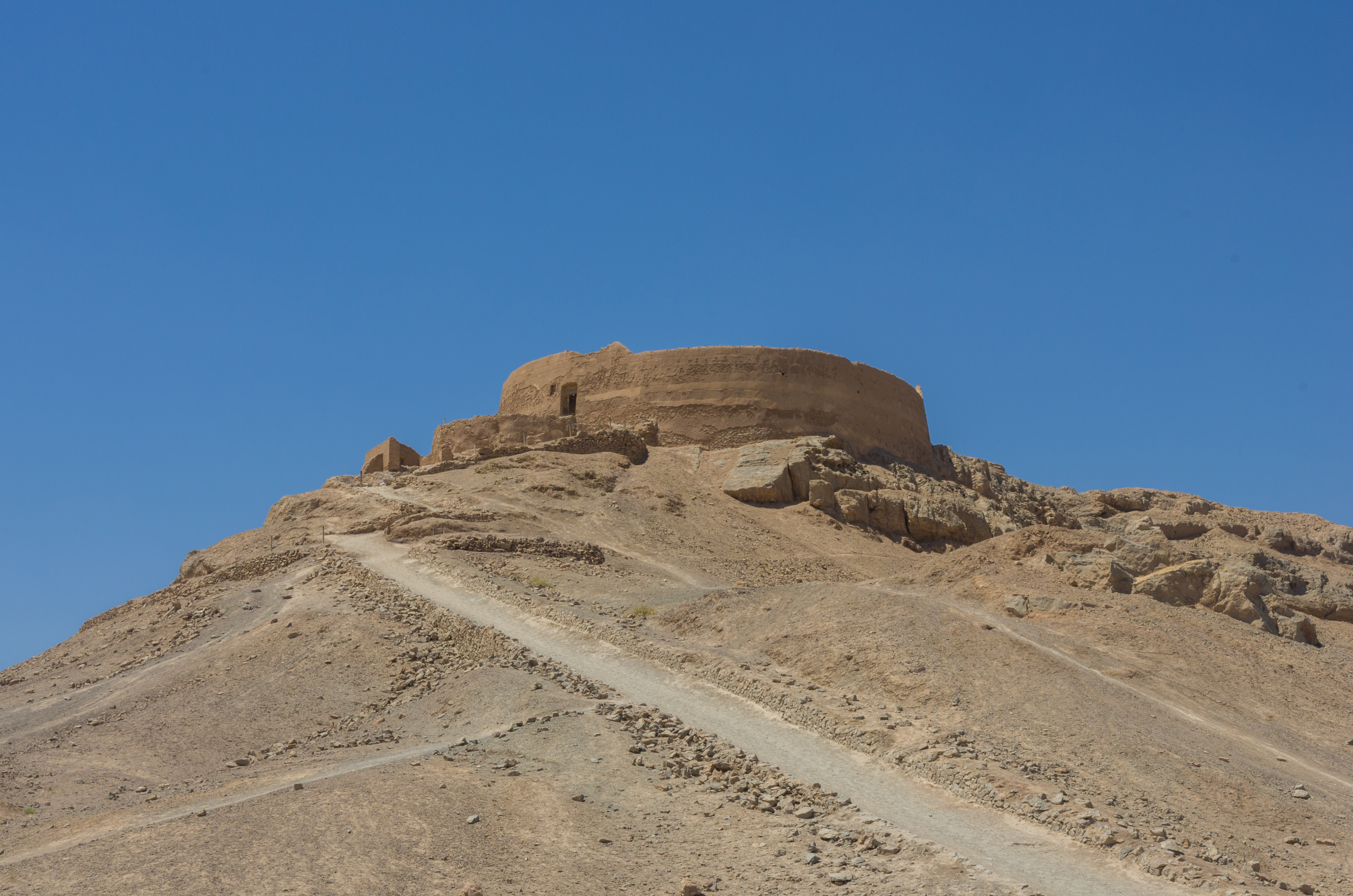 Tour du silence à Yazd